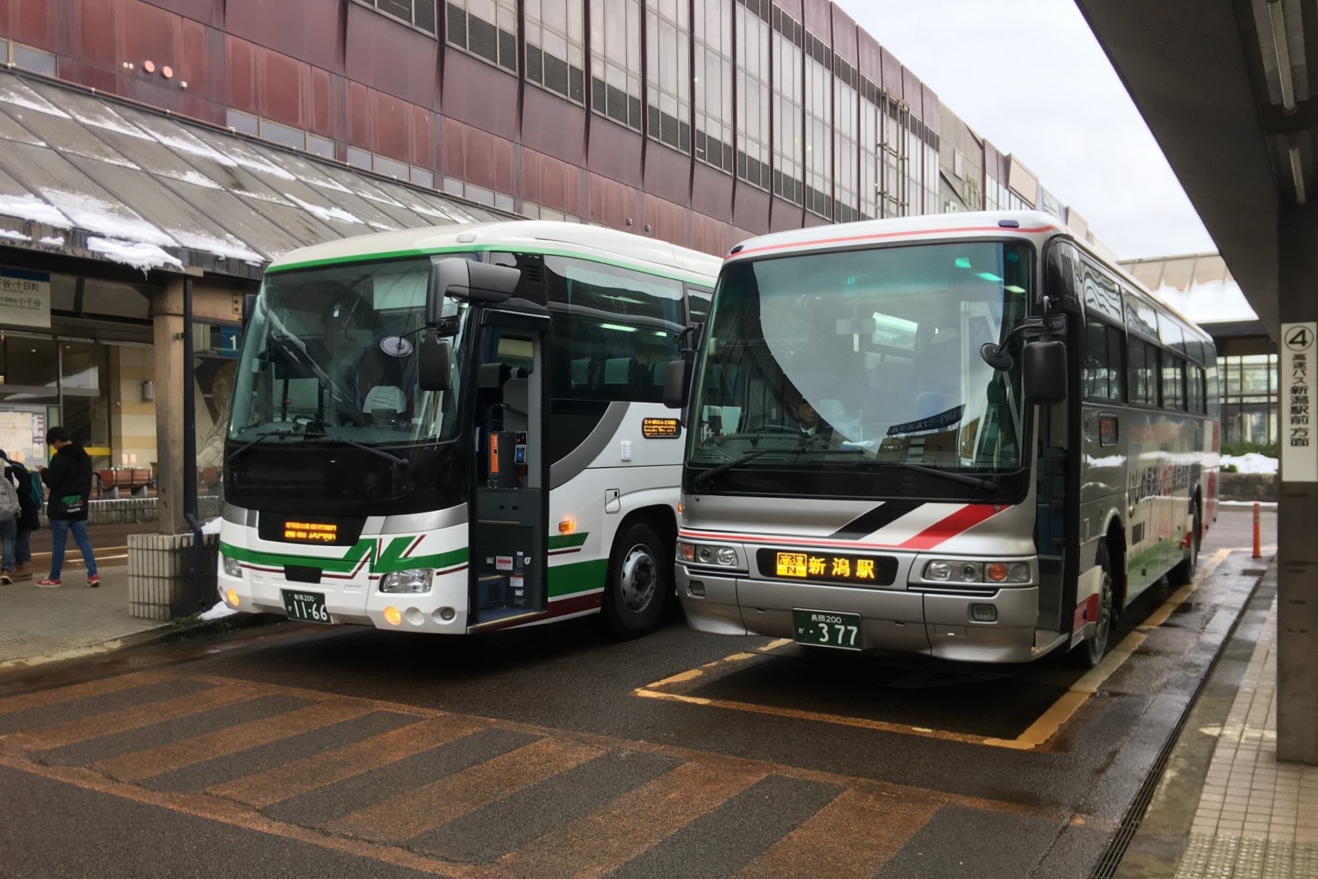 新潟県内高速バス 長岡線の車両（2018年12月、長岡駅）